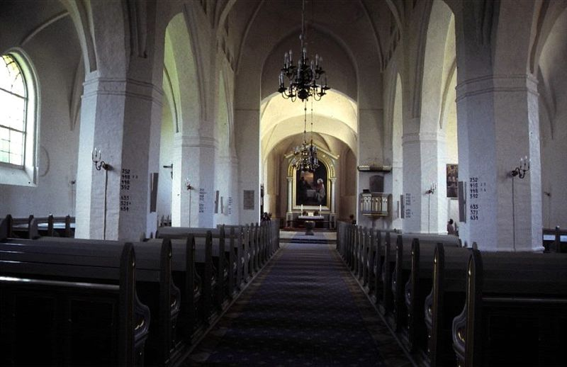 Faaborg Kirke i Danmark. Skibet set mod øst